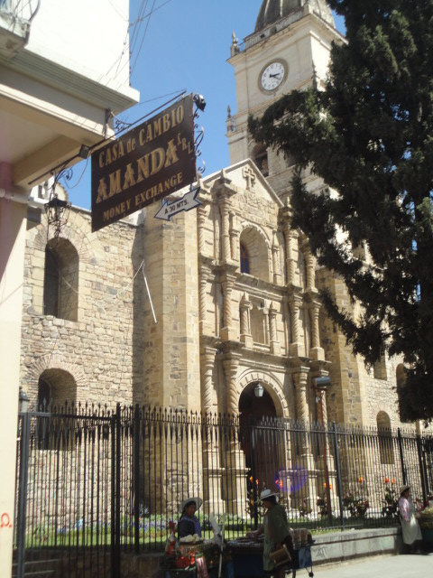 Catedral Metropolitana This medium shows the protected monument with the number C/00-000 in Bolivia.